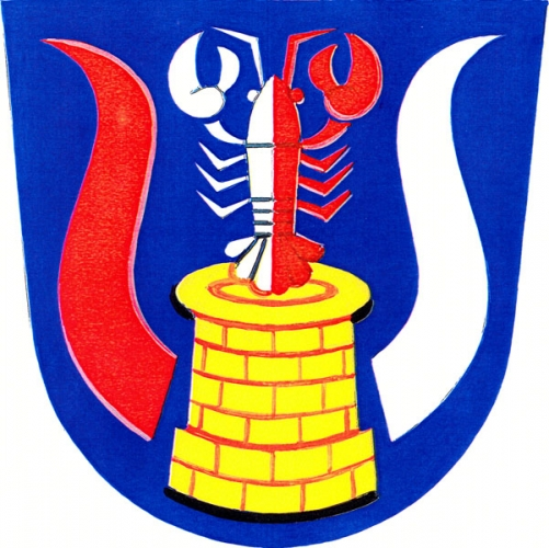 znak, Studnice, okres Třebíč